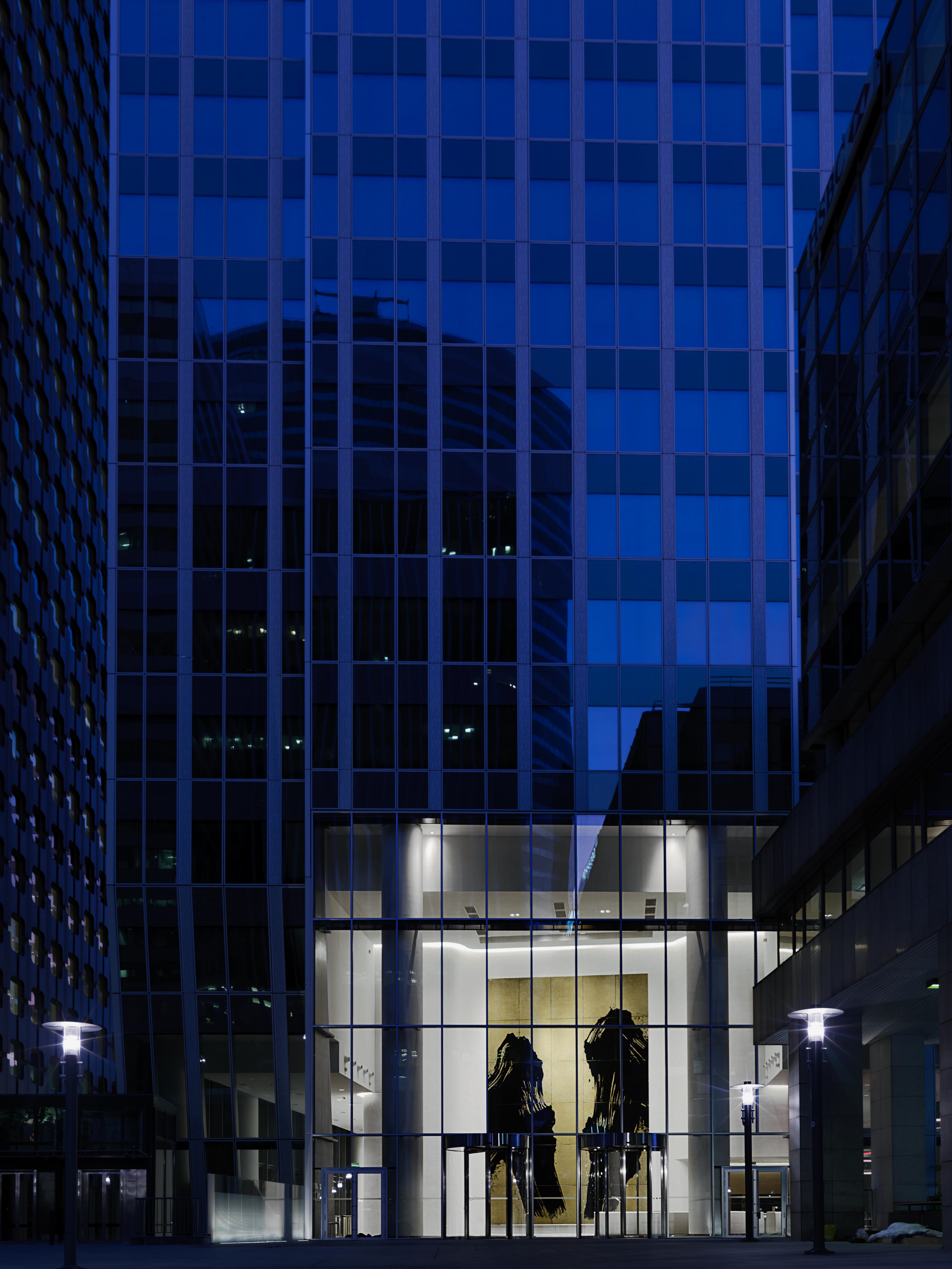 Photo de l'œuvre de Fabienne Verdier dans la tour Majunga, Défense, Paris